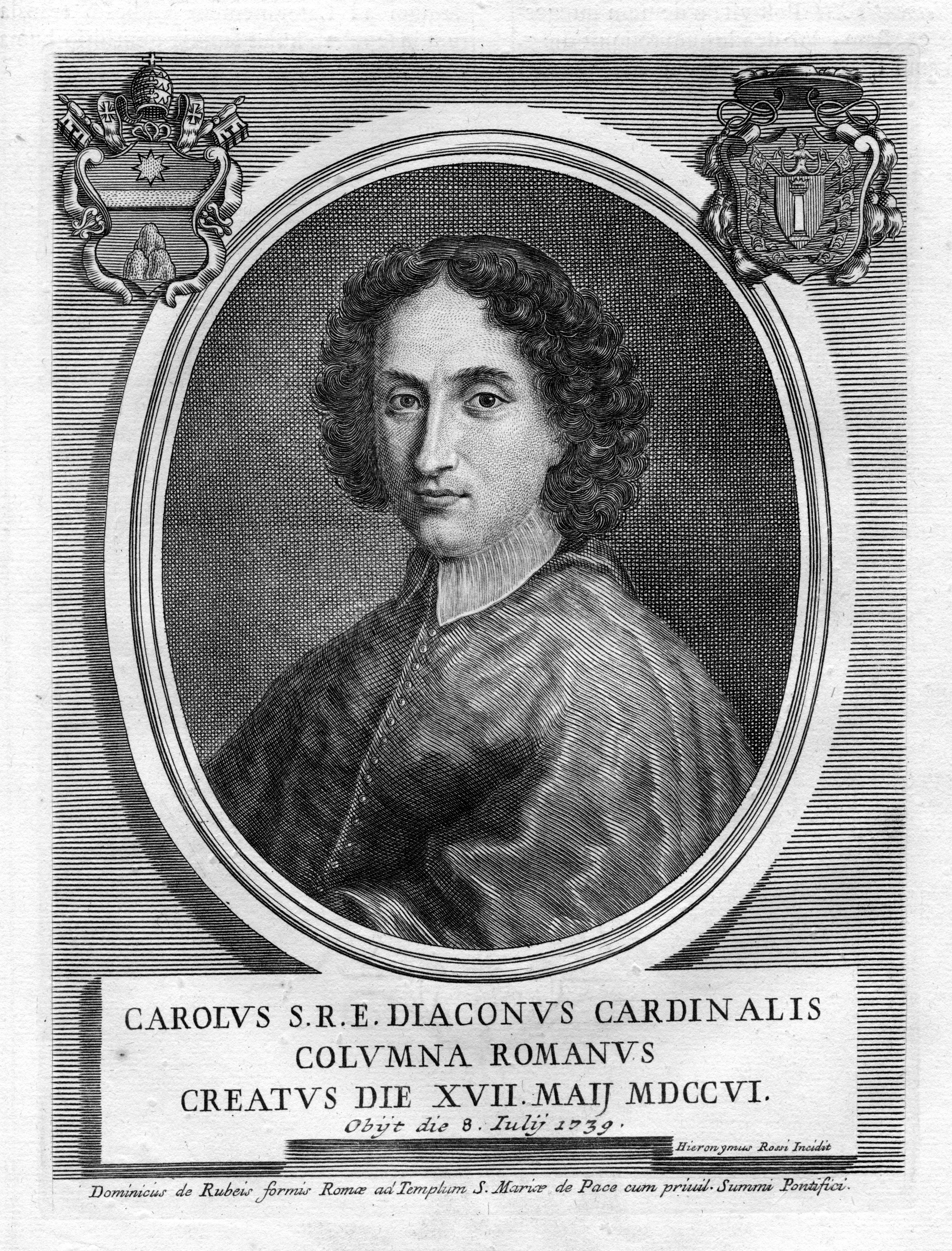 Portrait de Carlo Colonna (1665-1739)